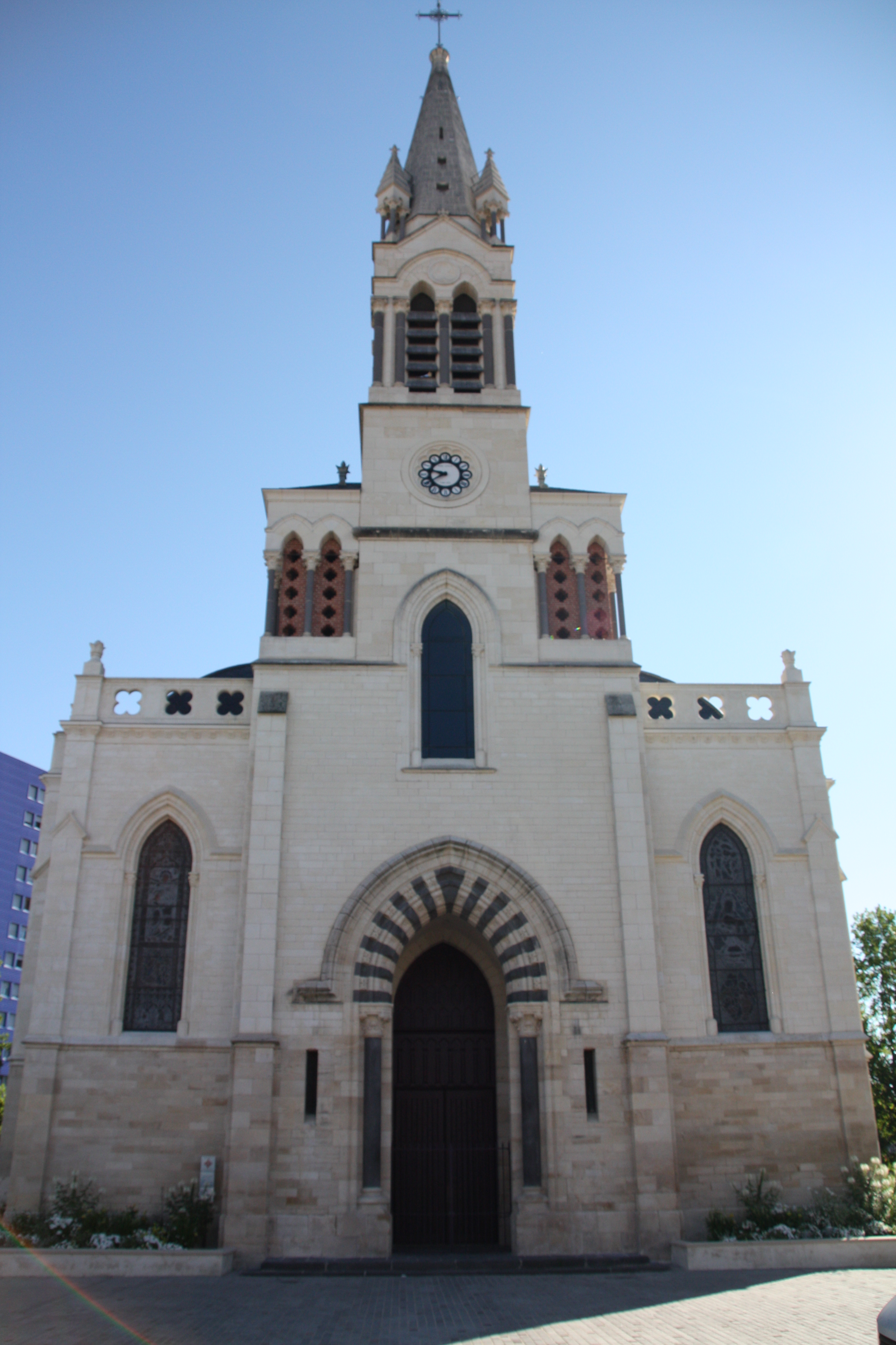 Église Saint-Paul à Montluçon France